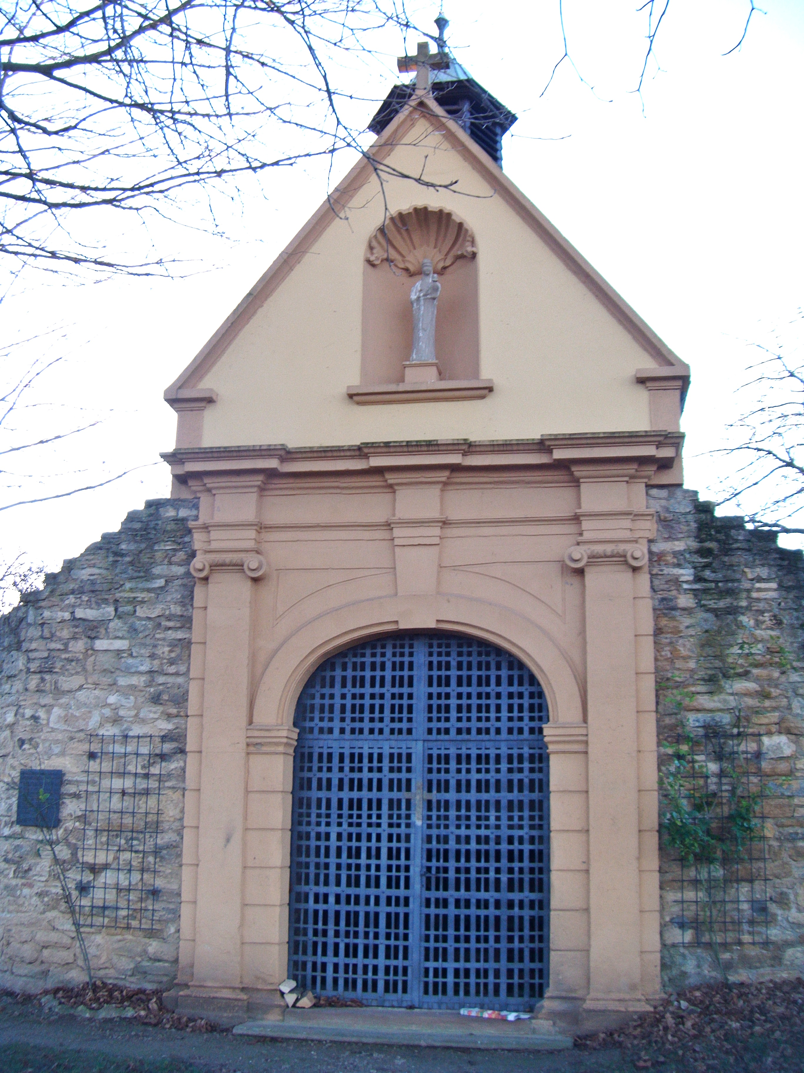 Bockenheim an der Weinstraße, Heiligenkirche (St. Peter), Fassade